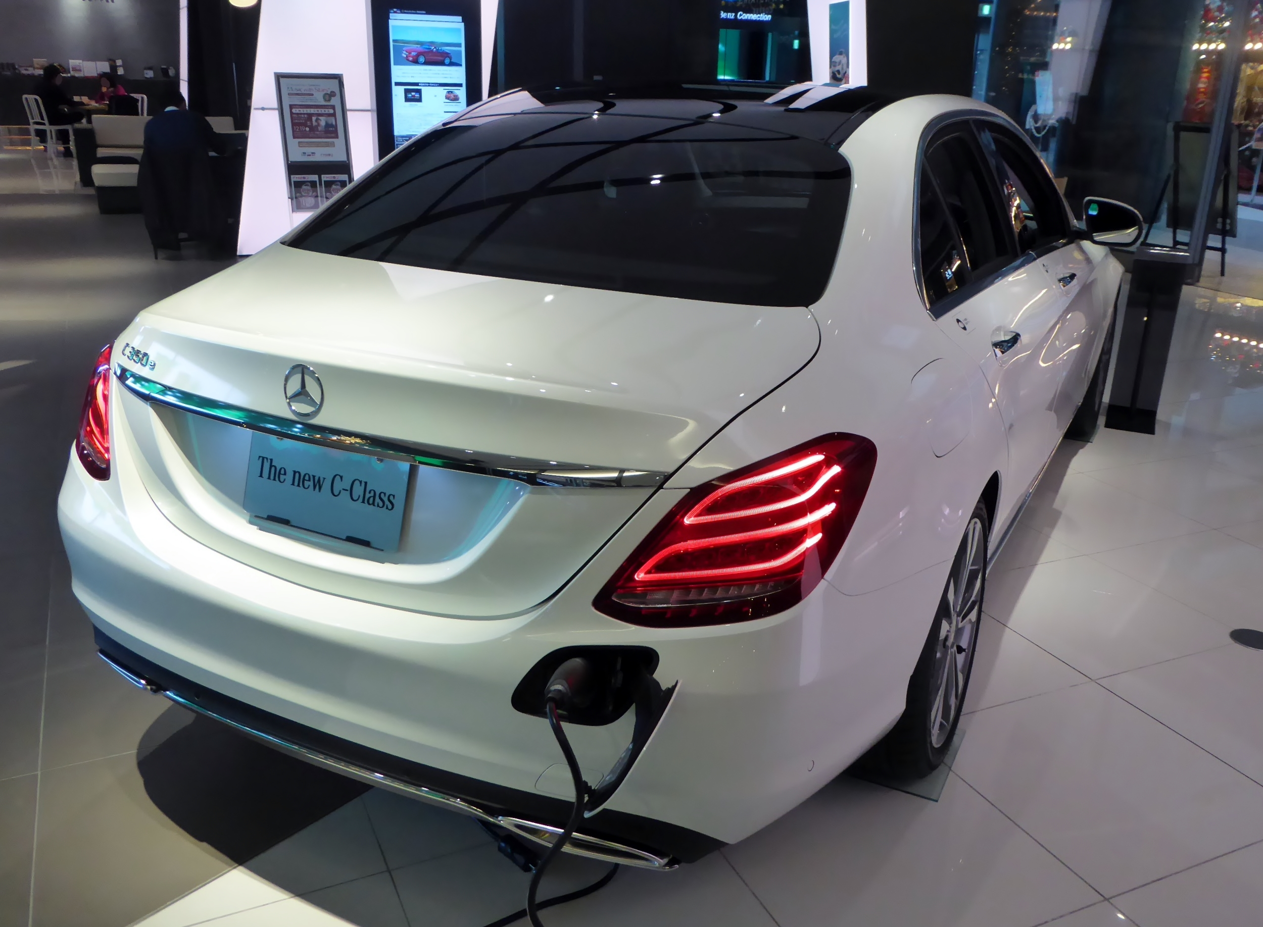 W205型メルセデス・ベンツ・C350eアヴァンギャルドをリアから撮影。